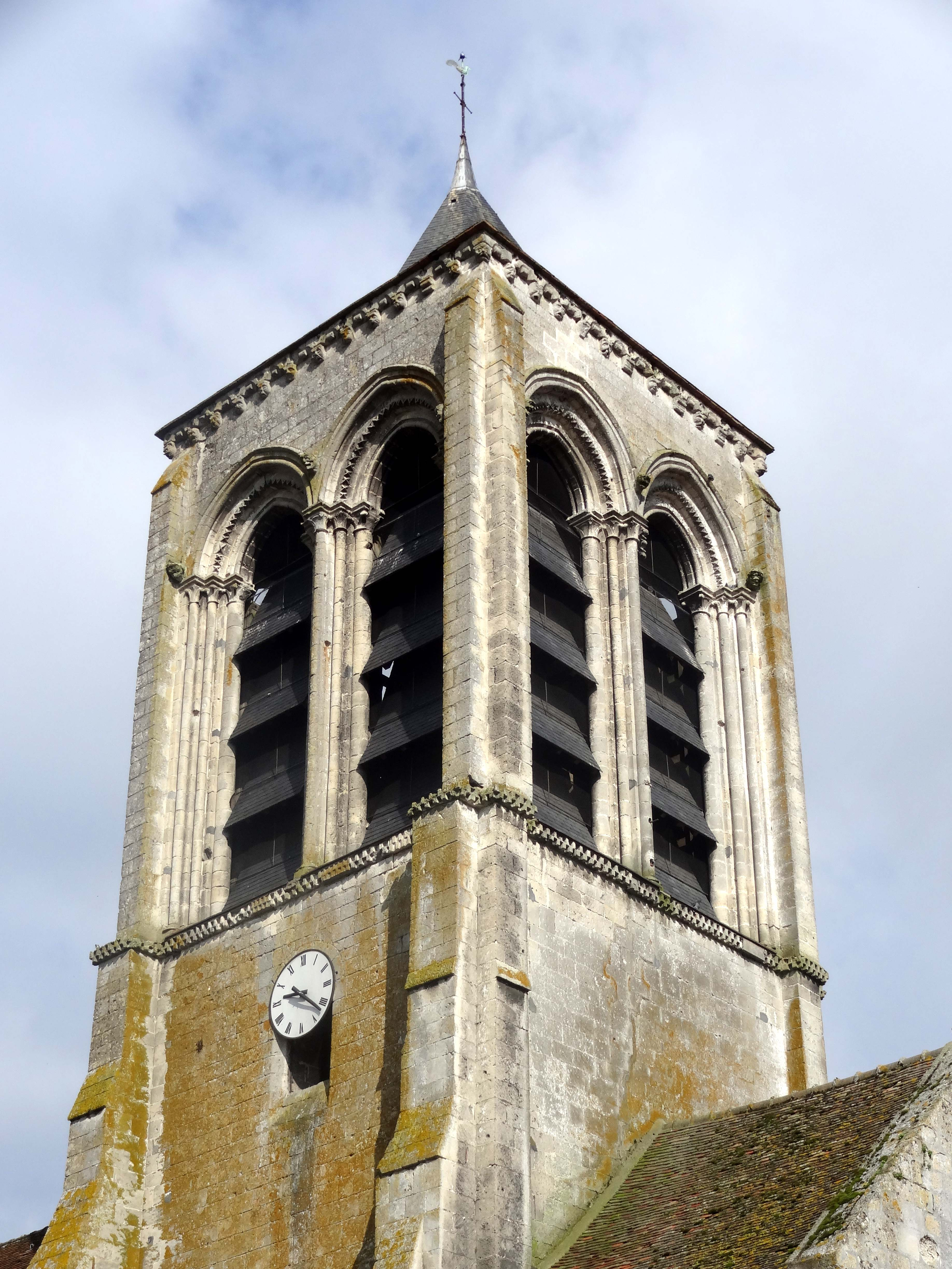 Église Saint-Barthélemy de Villeneuve-sur-Verberie - voir titre.